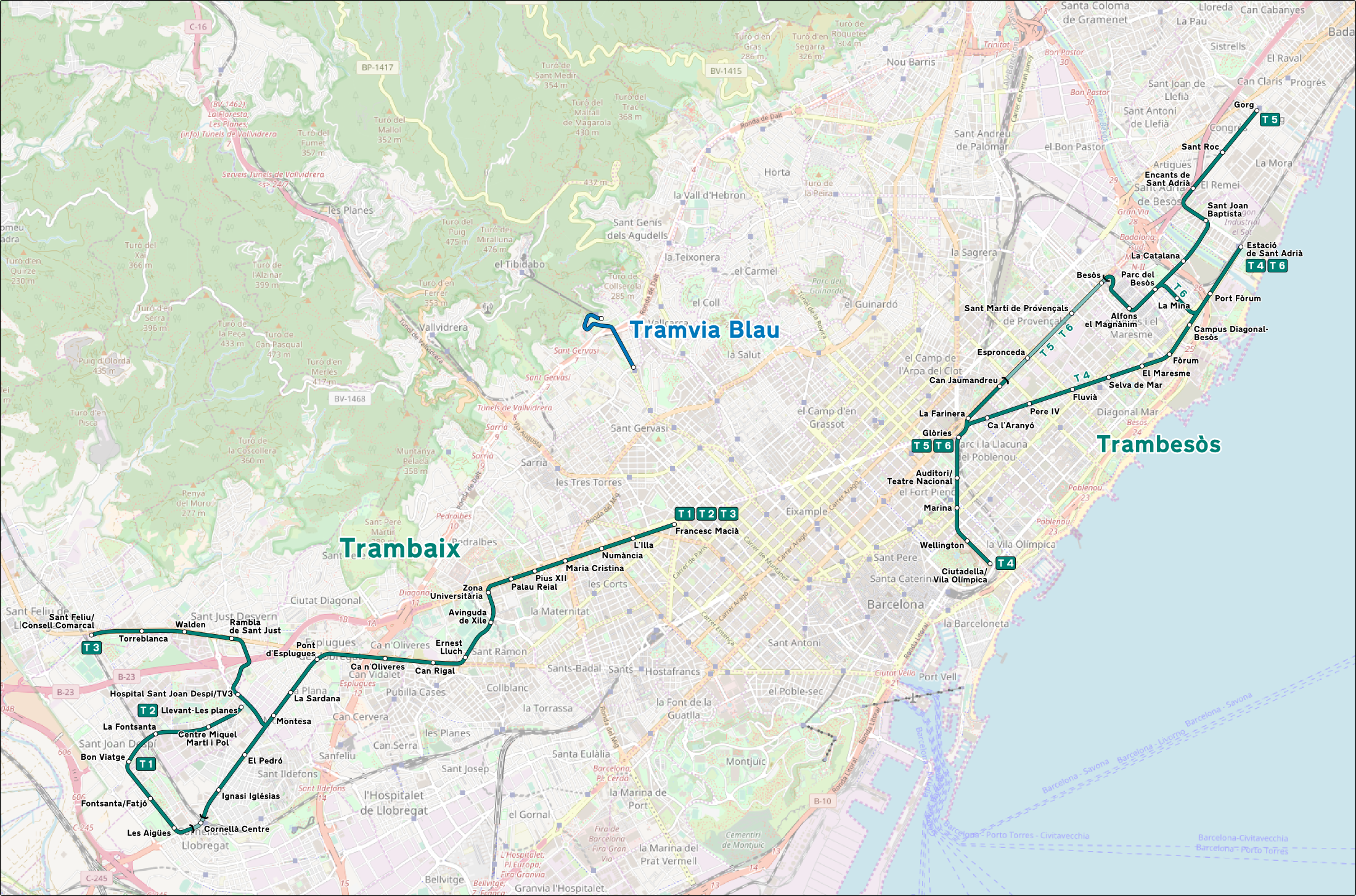 Mappa della rete tranviaria di Barcellona. This map may be incomplete, and may contain errors. Don't rely solely on it for navigation.